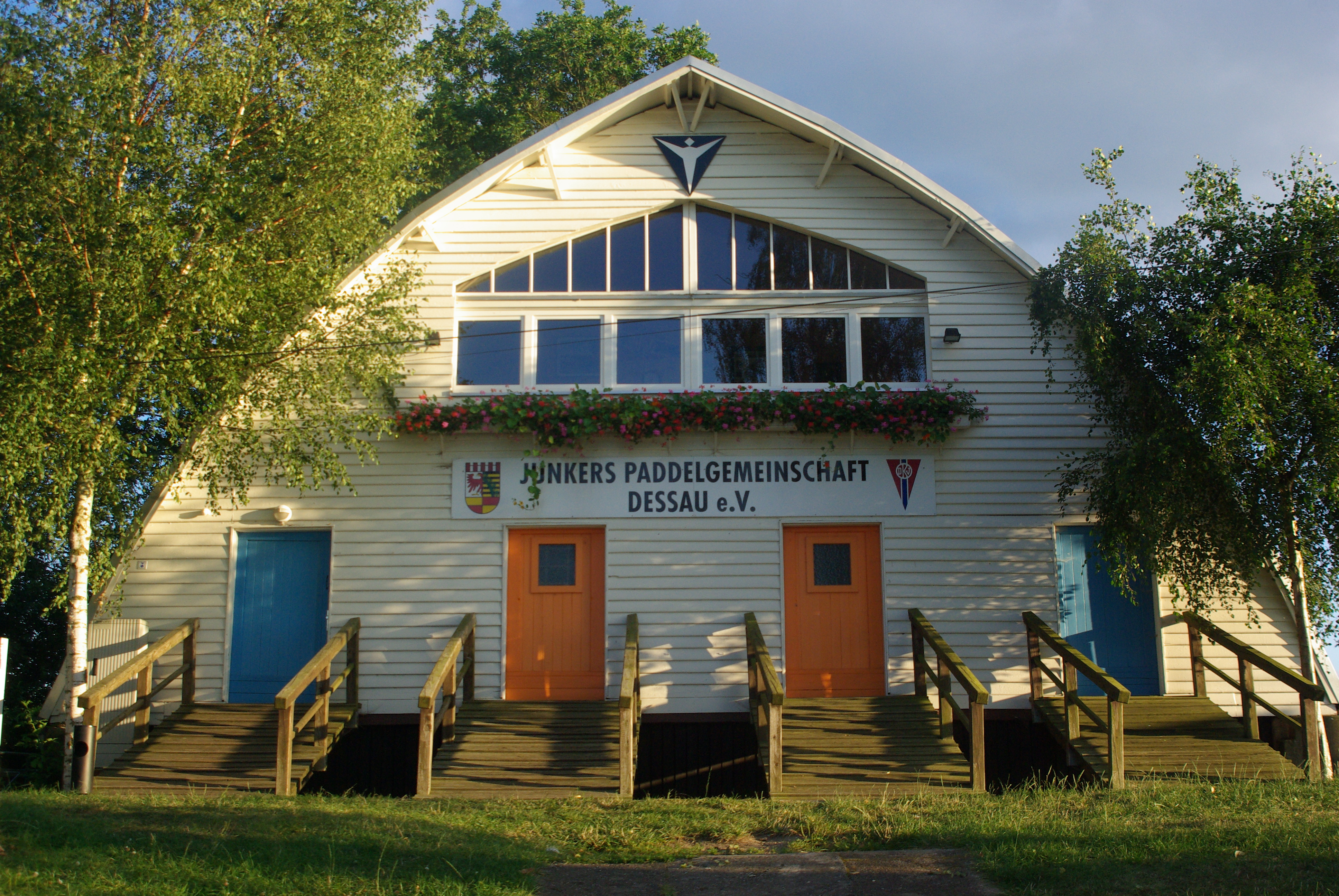 Denkmalgeschütztes Bootshaus der Junkers Paddelgemeinschaft in Stahllamellenkonstruktion